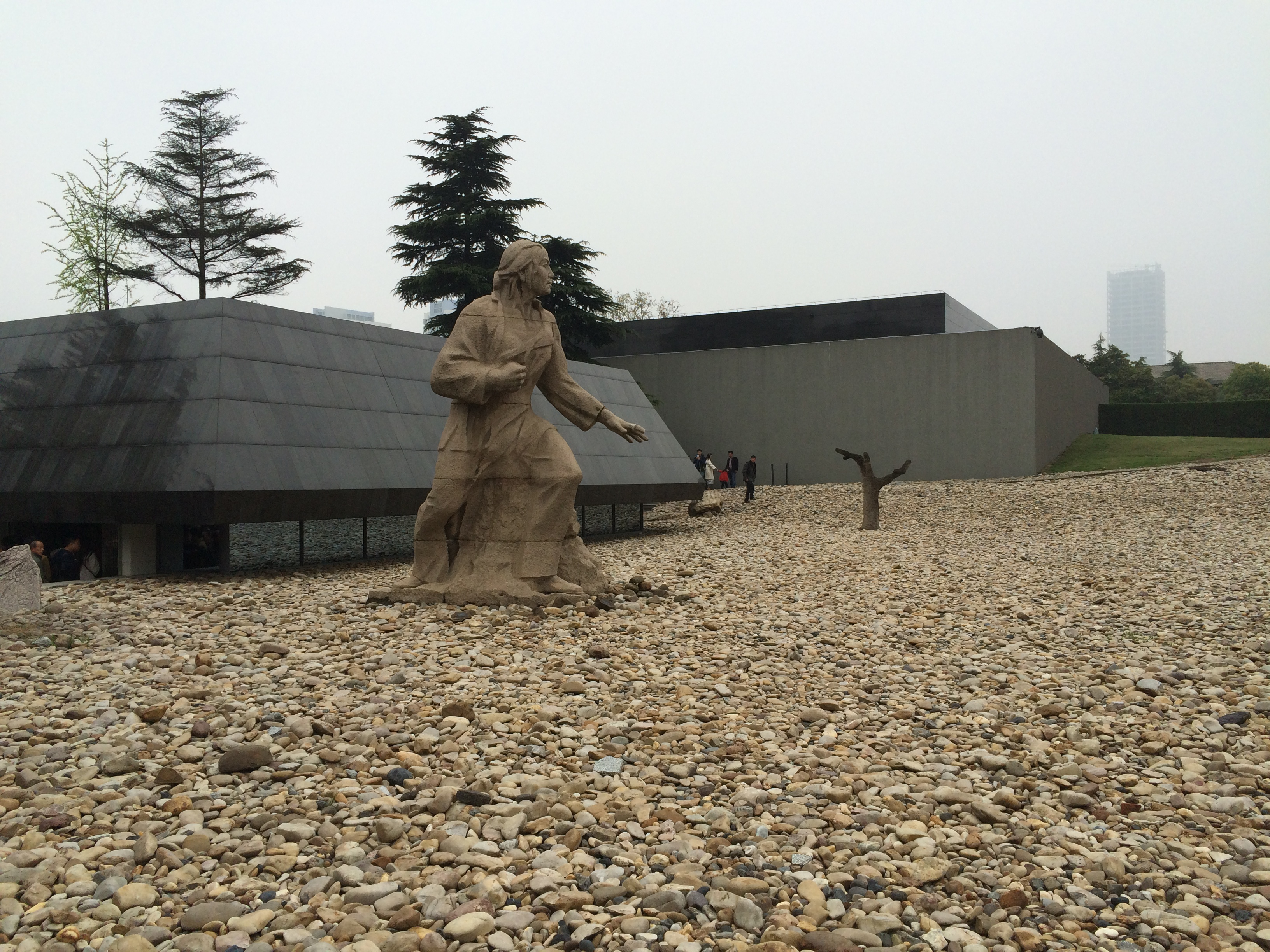 墓地广场的《母亲》雕塑。悲伤的母亲、枯树、寸草不生的卵石广场，表现出“死亡”的意象，与周围的绿树和青草相互对比，构成“生与死”的主题。同时，当现在人们走在这些碎石上，会发出类似凄苦哭声的声音。建于1985年。